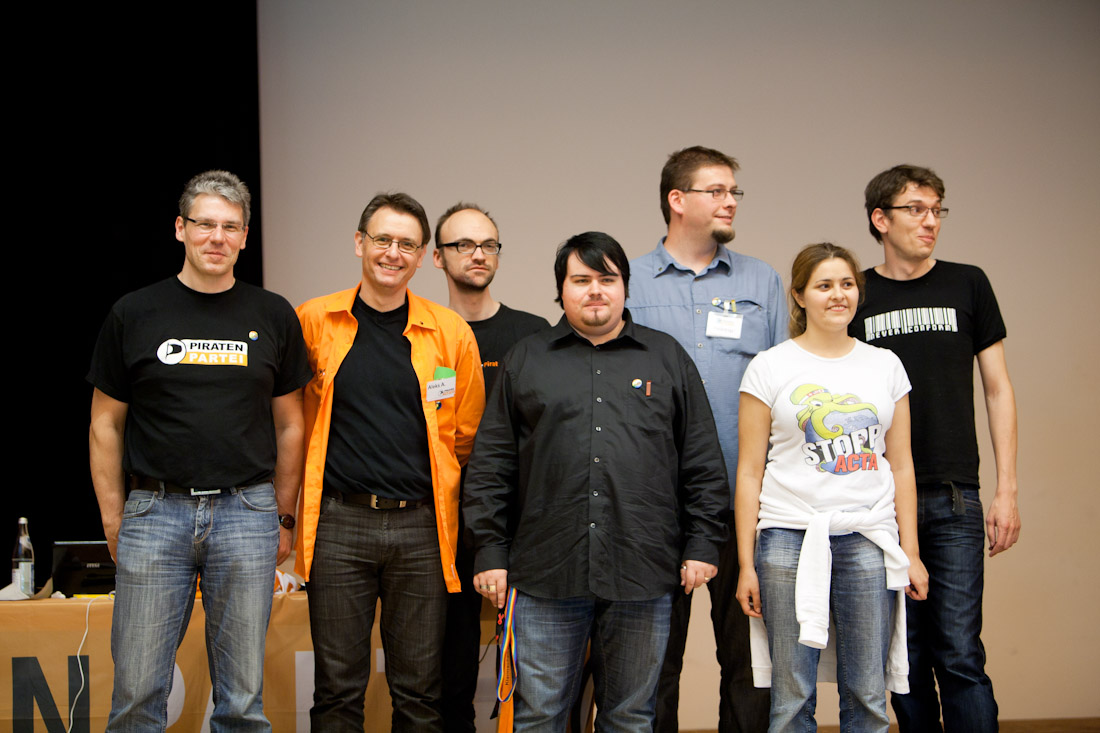 Vorstand des Landesverbandes Bayern der Piratenpartei Deutschland, 2010–2011: v.l.n.r.: Stefan Körner (Vorsitzender); Aleks A. Lessmann (Politischer Geschäftsführer); Arthur Schibetz (Schatzmeister); Dominique Schramm (Generalsekretär); Roland Jungnickel (Stellvertretender Vorsitzender); Haide Friedrich Salgado (Beisitzerin); Klaus Mueller (Beisitzer)